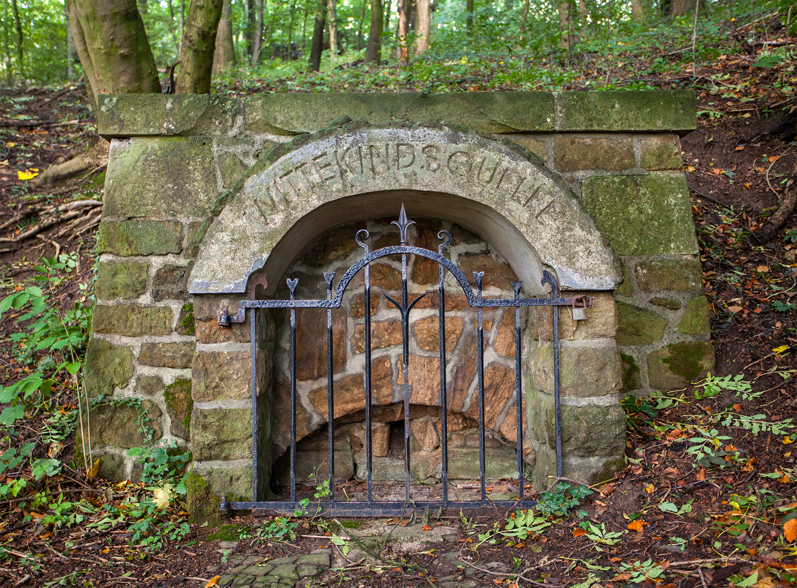 Die in Stein gefasste und seit 1938 versiegte Wittekindsquelle auf dem Wittekindsberg bei Porta Westfalica